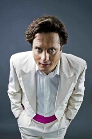 Pressefoto Michael Sens 2007 fotografiert von Felix Rachor